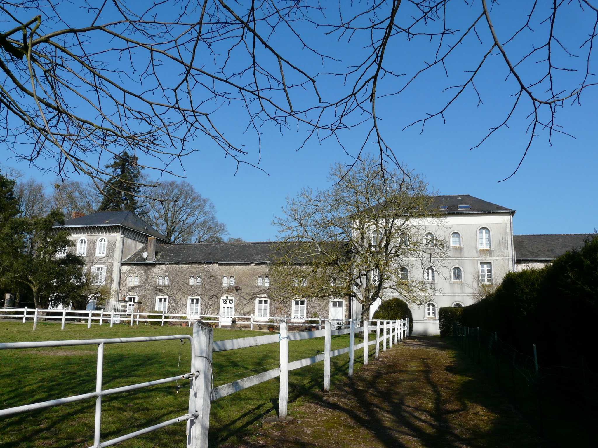 Partie ouest de l'ancienne école d'agriculture de Grandjouan